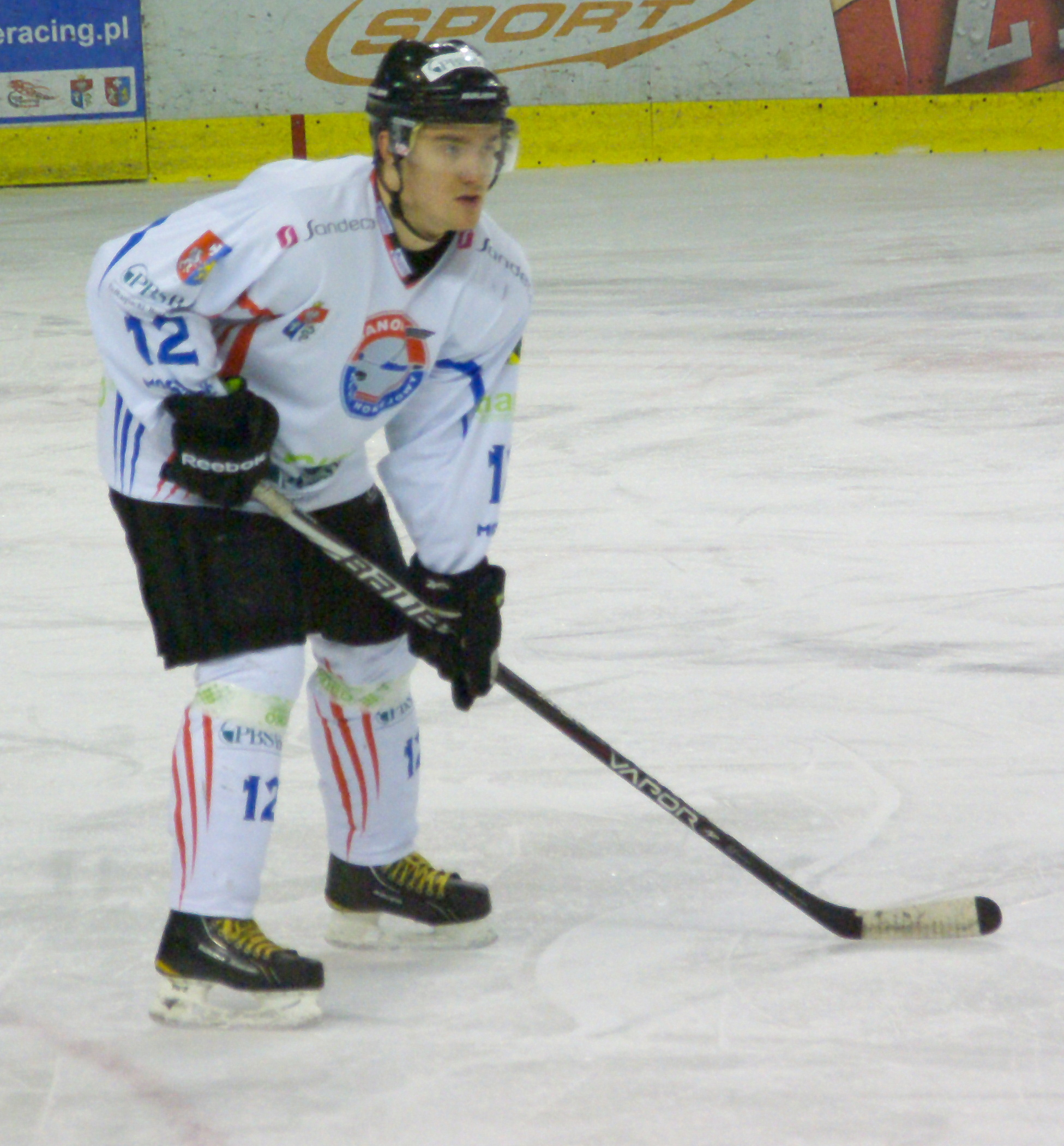 Paweł Dronia w barwach Ciarko PBS Bank Sanok w meczu z Zagłębiem Sosnowiec 10 lutego 2012